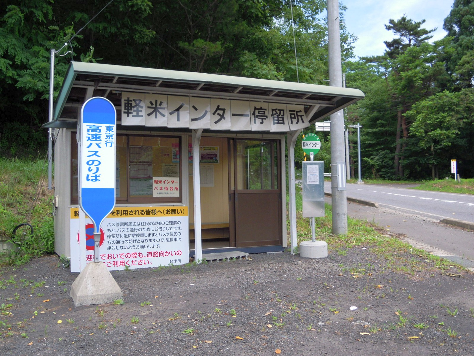 岩手県九戸郡軽米町の国道340号沿いある軽米インター停留所待合室